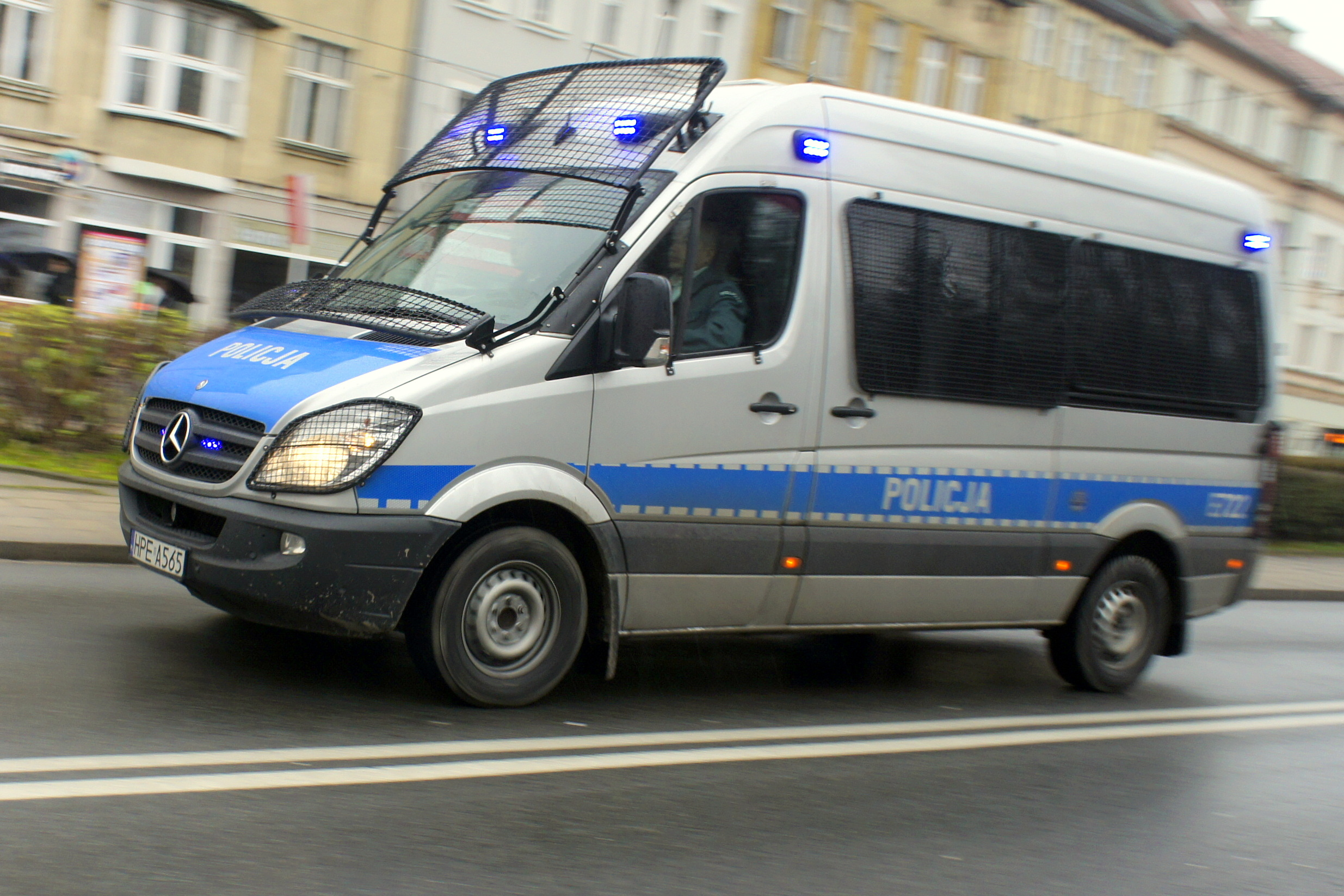 Furgonetka Mercedes Sprinter 316 CDI oddziałów prewencji policji (Gorzów Wlkp.)